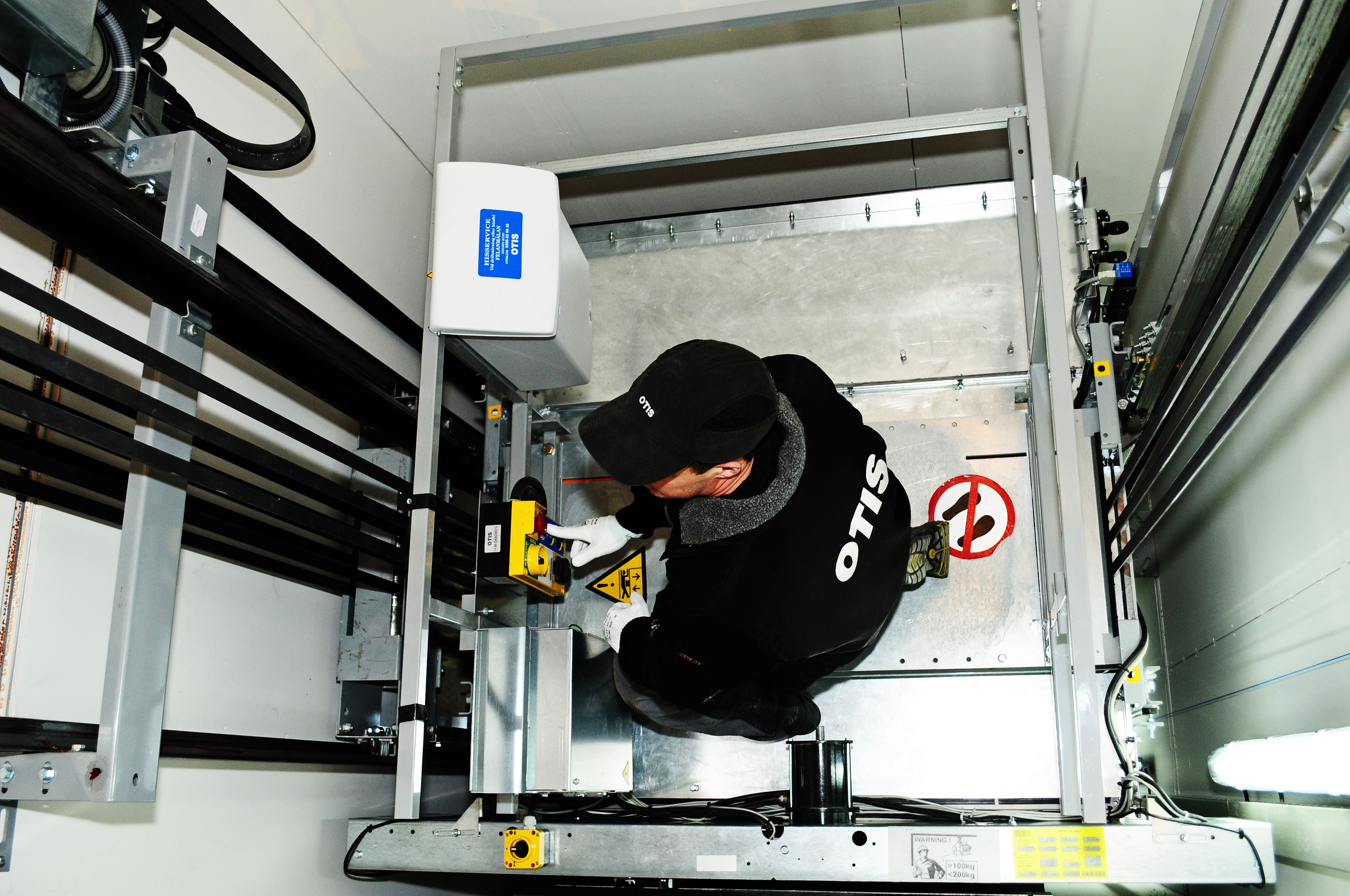 En OTIS GEN 2 Comfort Hiss i Intersport Hageby Centrum, Norrköping sätt ovanifrån.